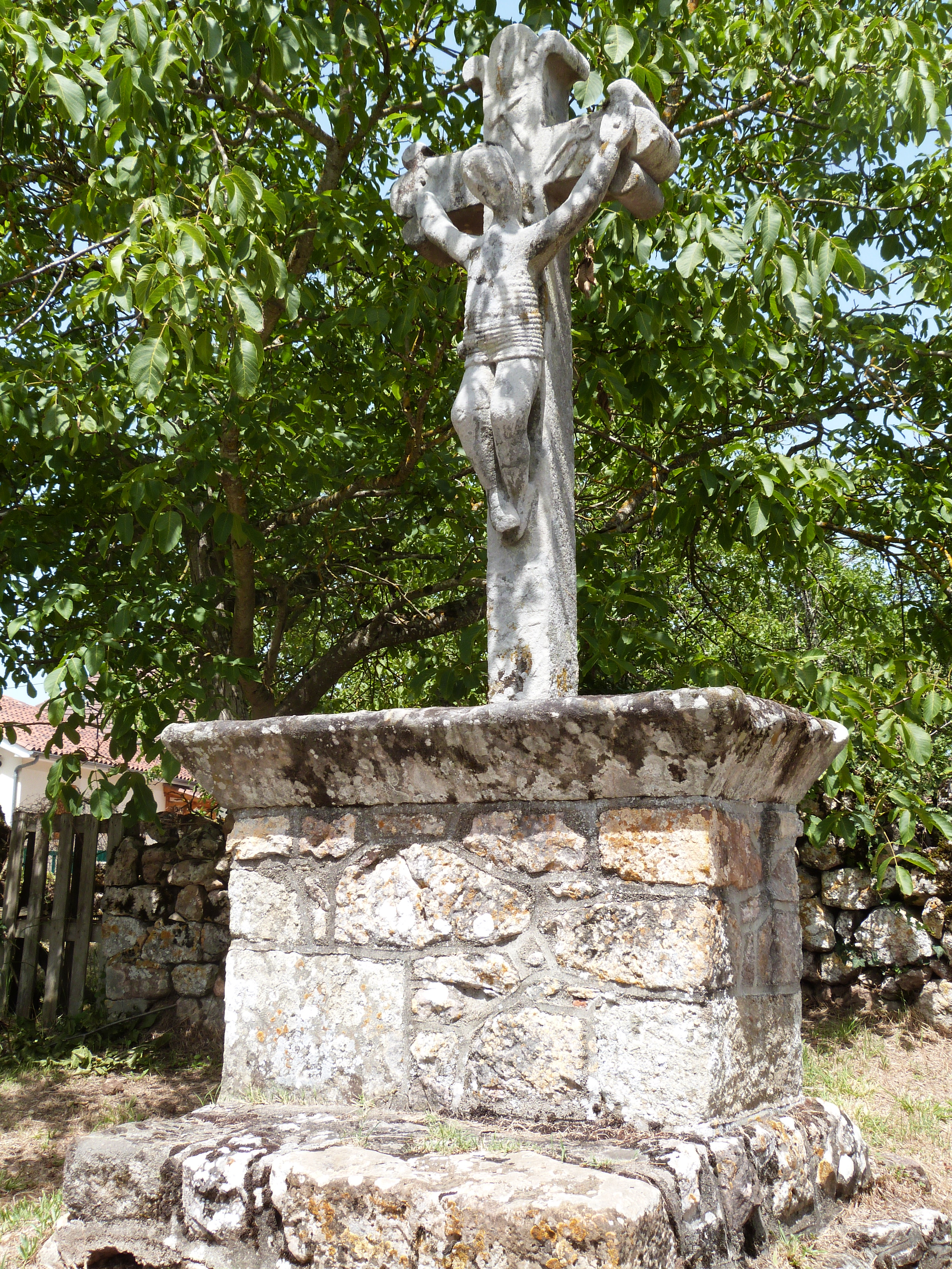 Croix de Capdenac (Classé) .